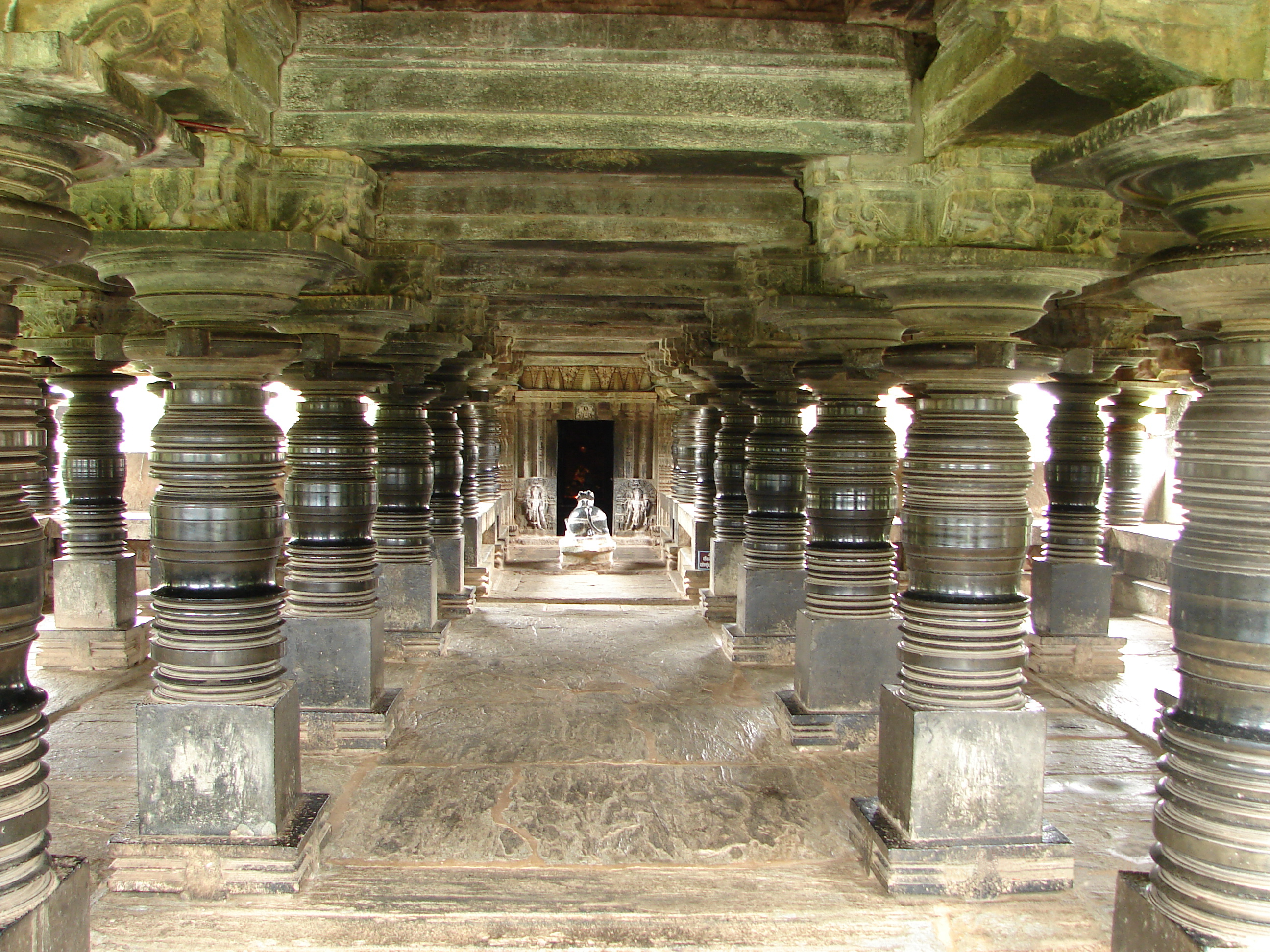 Amritheswara temple in Amrithapura, Chikkamagaluru district, Karnataka state, India